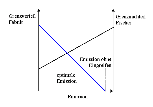 schematische Darstellung der Emissionsmenge ohne staatlichen Eingriff